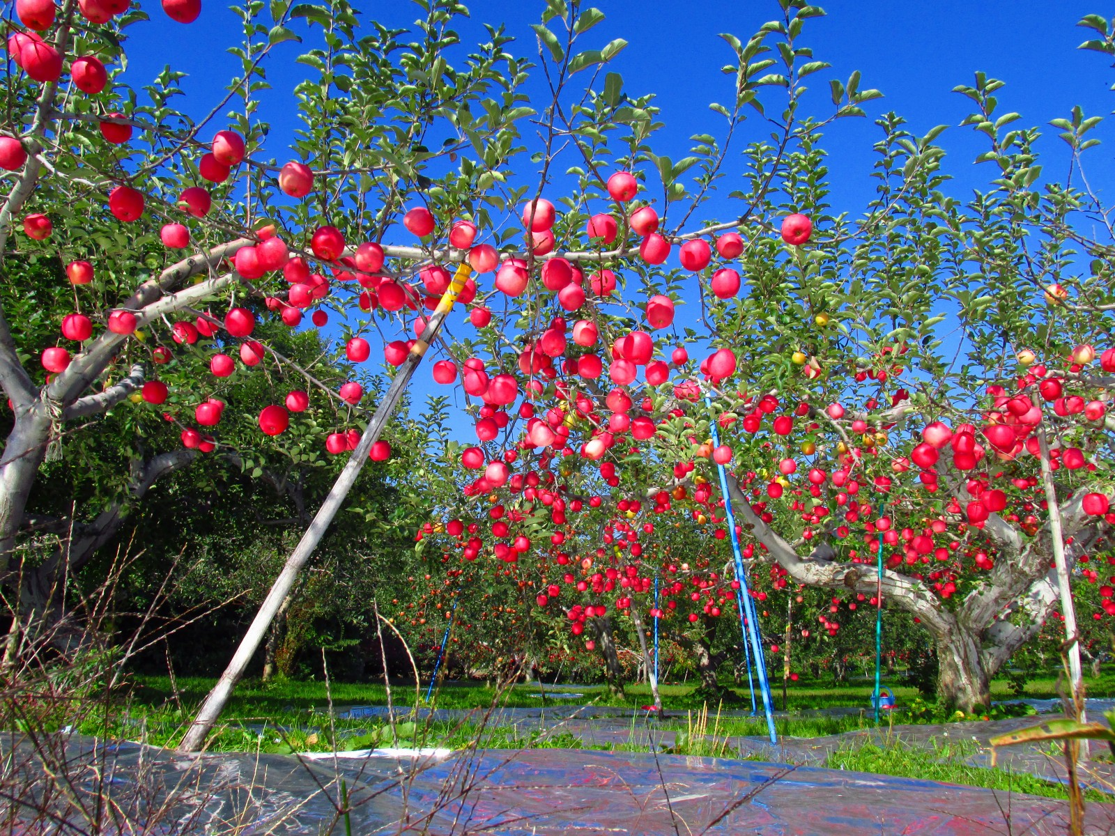 日本国 青森県 弘前市 岩木 フジ。袋掛けし、出荷前に袋を取って色付けする。地面に反射シートを敷き、満遍なく日光に当てることで色が鮮やかになる。袋掛けをしないサンフジは色がやや濃い目だが、フジ（袋掛けあり）は色が美しく、贈答用として一般的。サンフジほど糖度は高くはないが、日持ちはサンフジよりもフジの方が良い。市場に一般的に出回る主力品種はこのフジ。